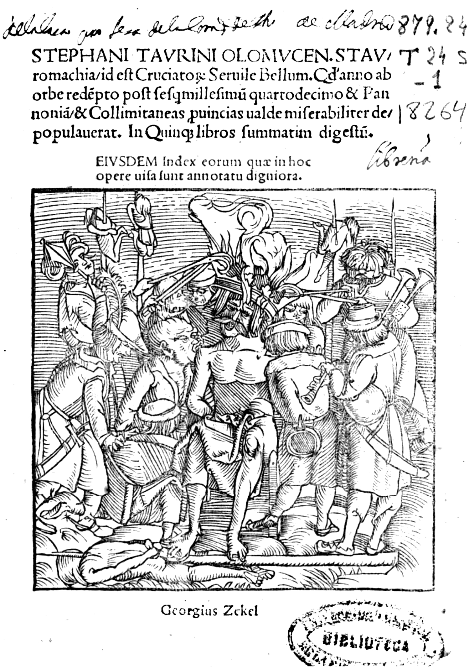 Illusztráció a Stephani Taurini Olomucen. Stauromachia, id est Cruciator Servile Bellum, ... In quinque libros summatim digestum. Euisdem index eorum quae in hoca opere visa sunt annotatu digniora című műből. Kiadó per Ioannem Singrenium, 1519